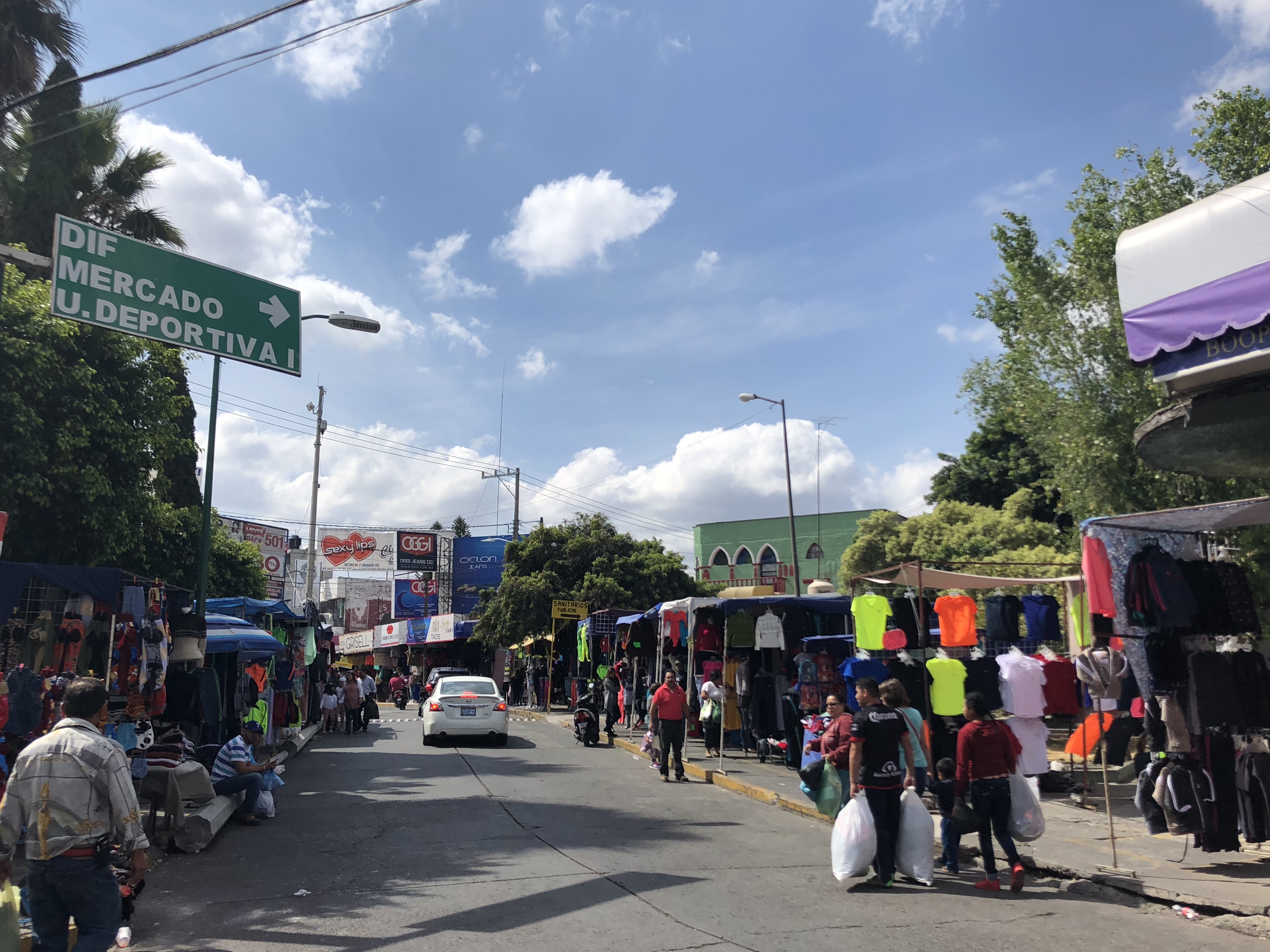 Zona Comercial Textil Uriangato en la Av. Álvaro Obregón, imagen que muestra los puestos de ropa de Uriangato.